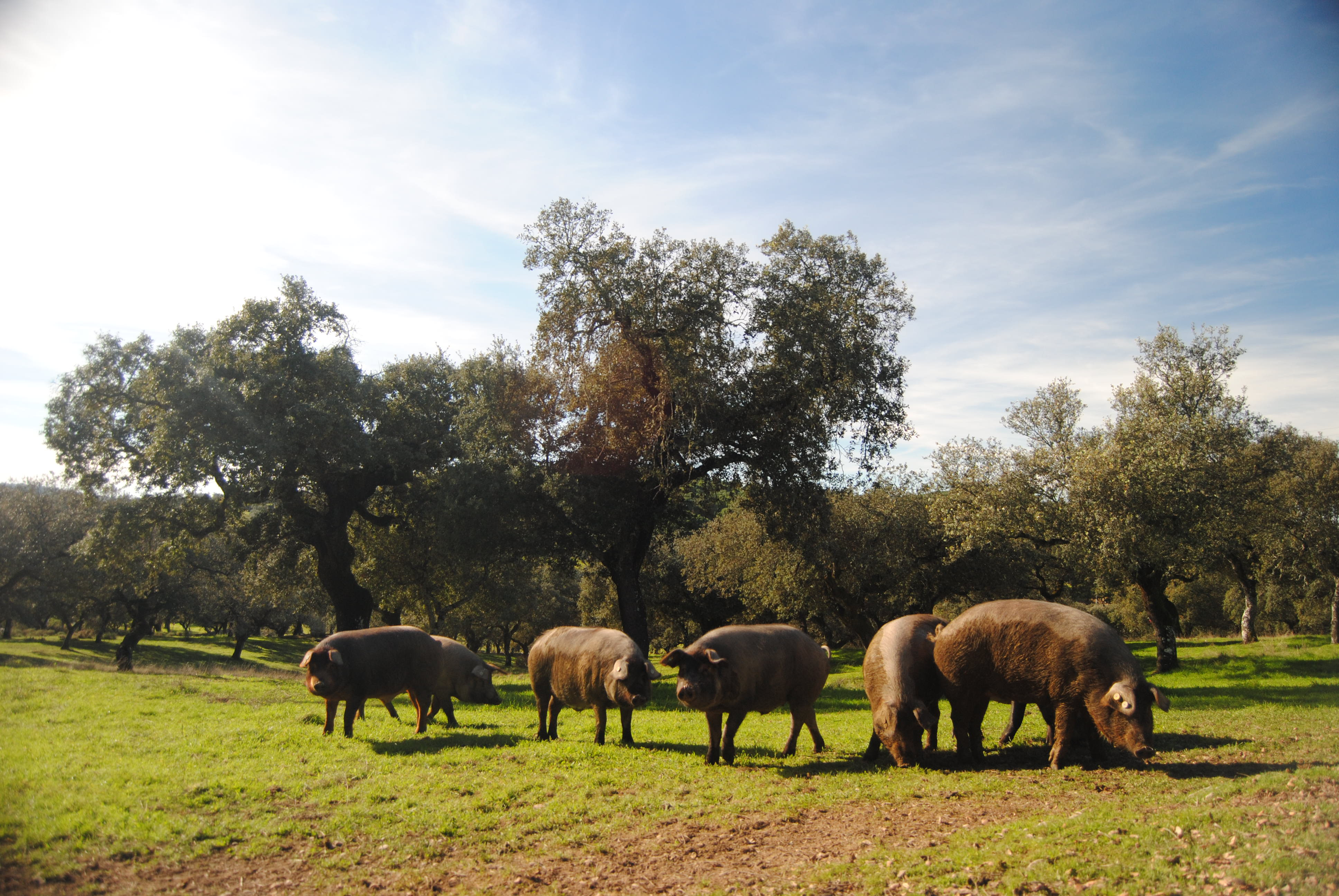 Provincia de Badajoz, Extremadura, España.